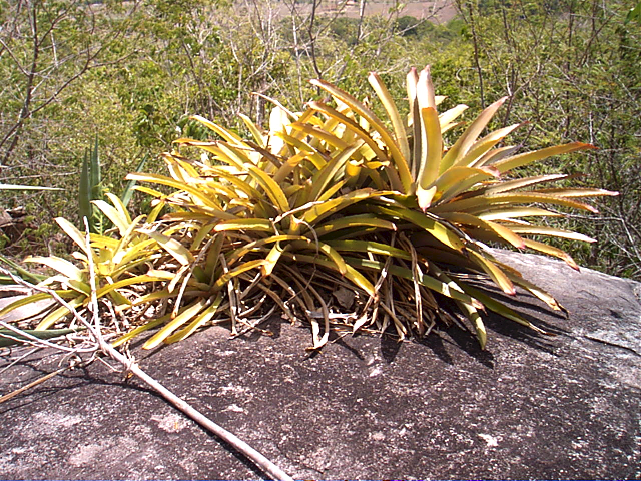 Macambira, nome popular da Bromelia laciniosa